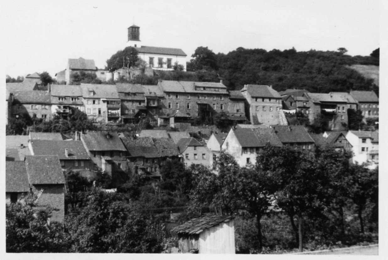 Gemeinde Grumbach/Glan